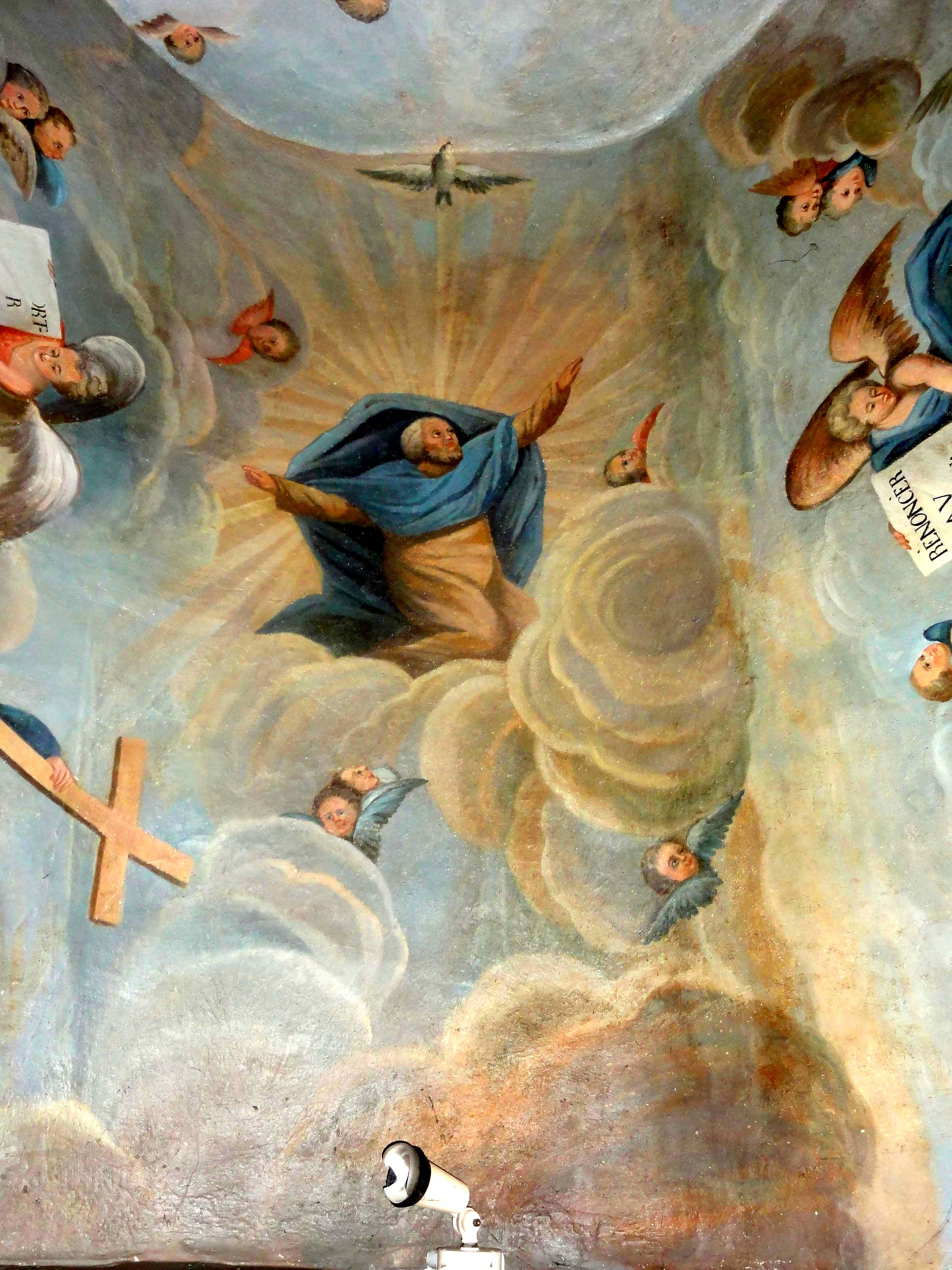 Dais des fonts baptismaux, plafond.